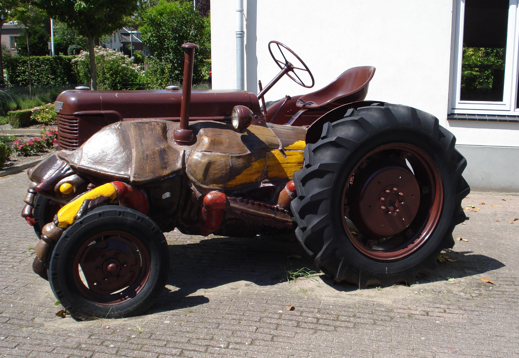 Dordrecht, Dubbelsteynlaan West 54. Kunstwerk "Trektor" van Ingrid Mol. Dordrecht/The Netherlands. FOP.